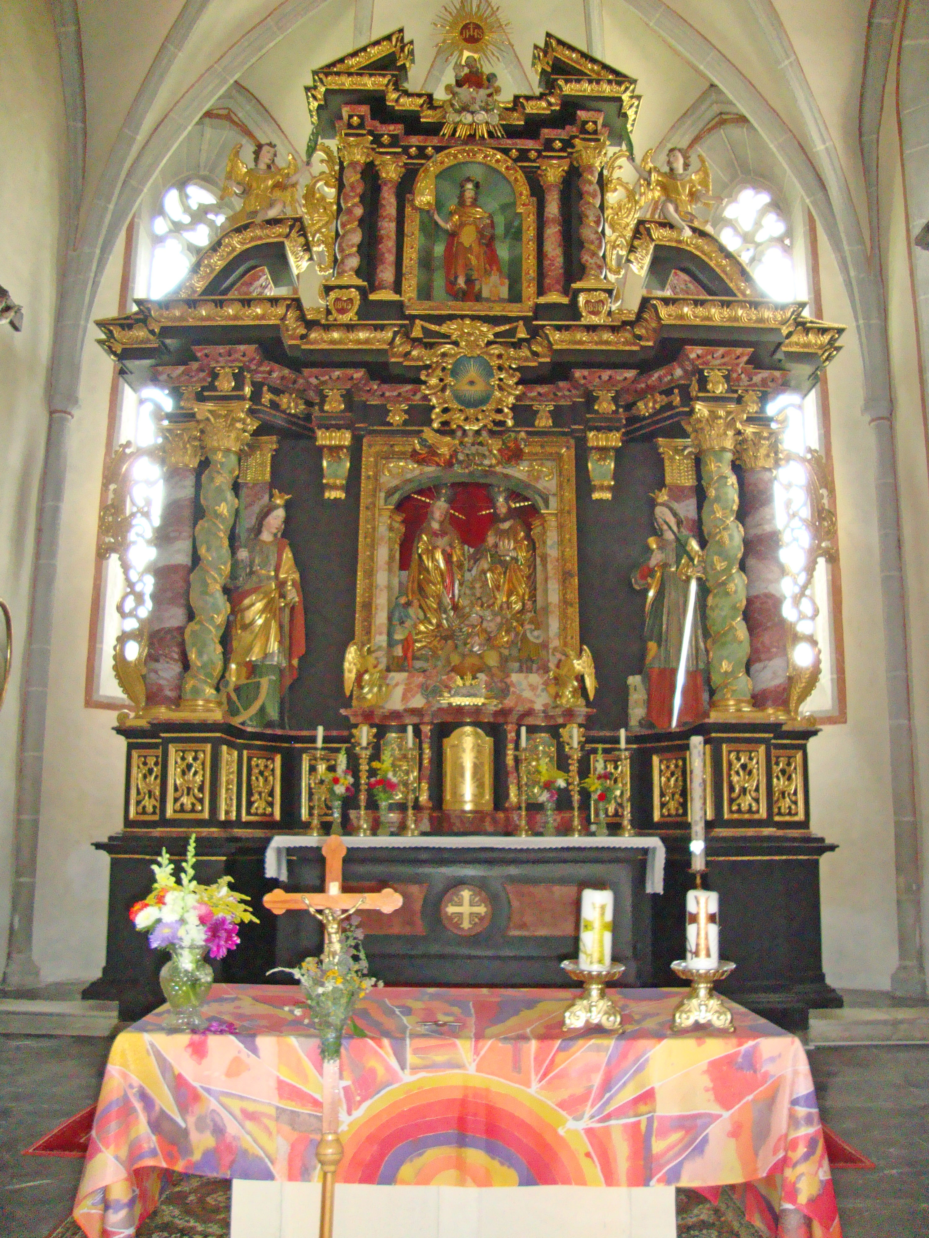 Kath. Pfarrkirche hl. Maria und Friedhof